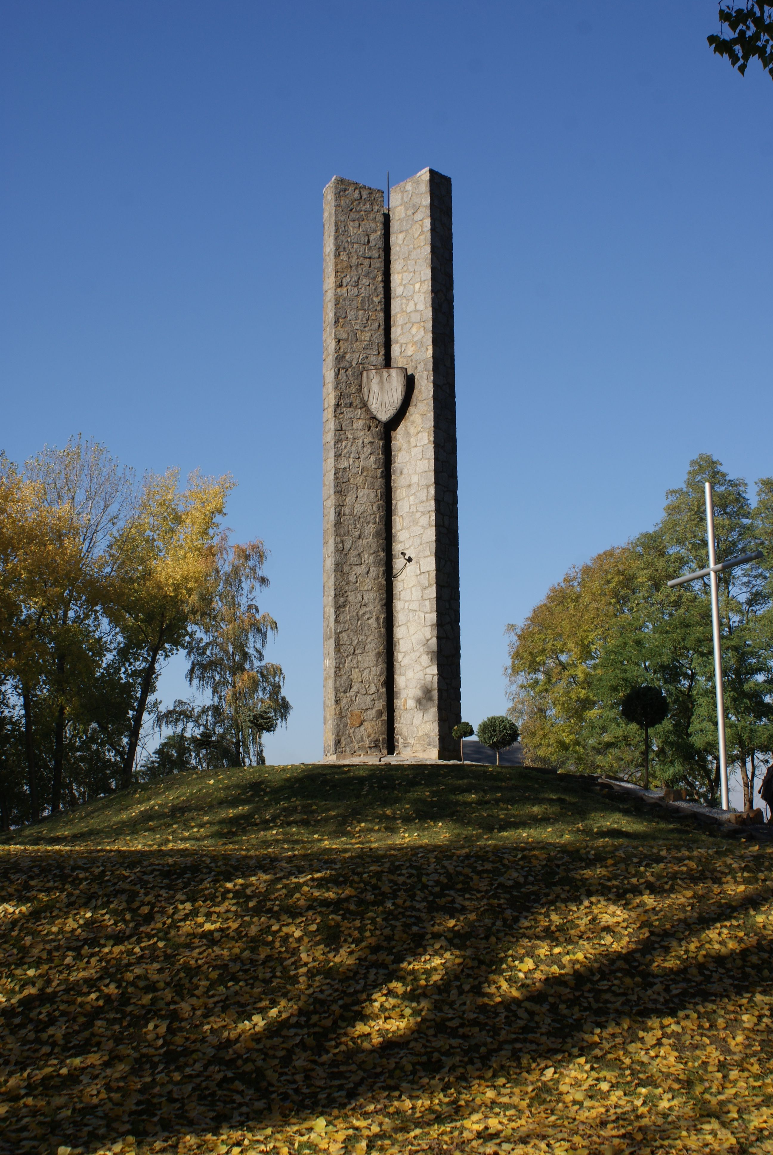 Pomnik upamiętniający miejsce bitwy wojsk Władysława Łokietka z Krzyżakami w 1331r.